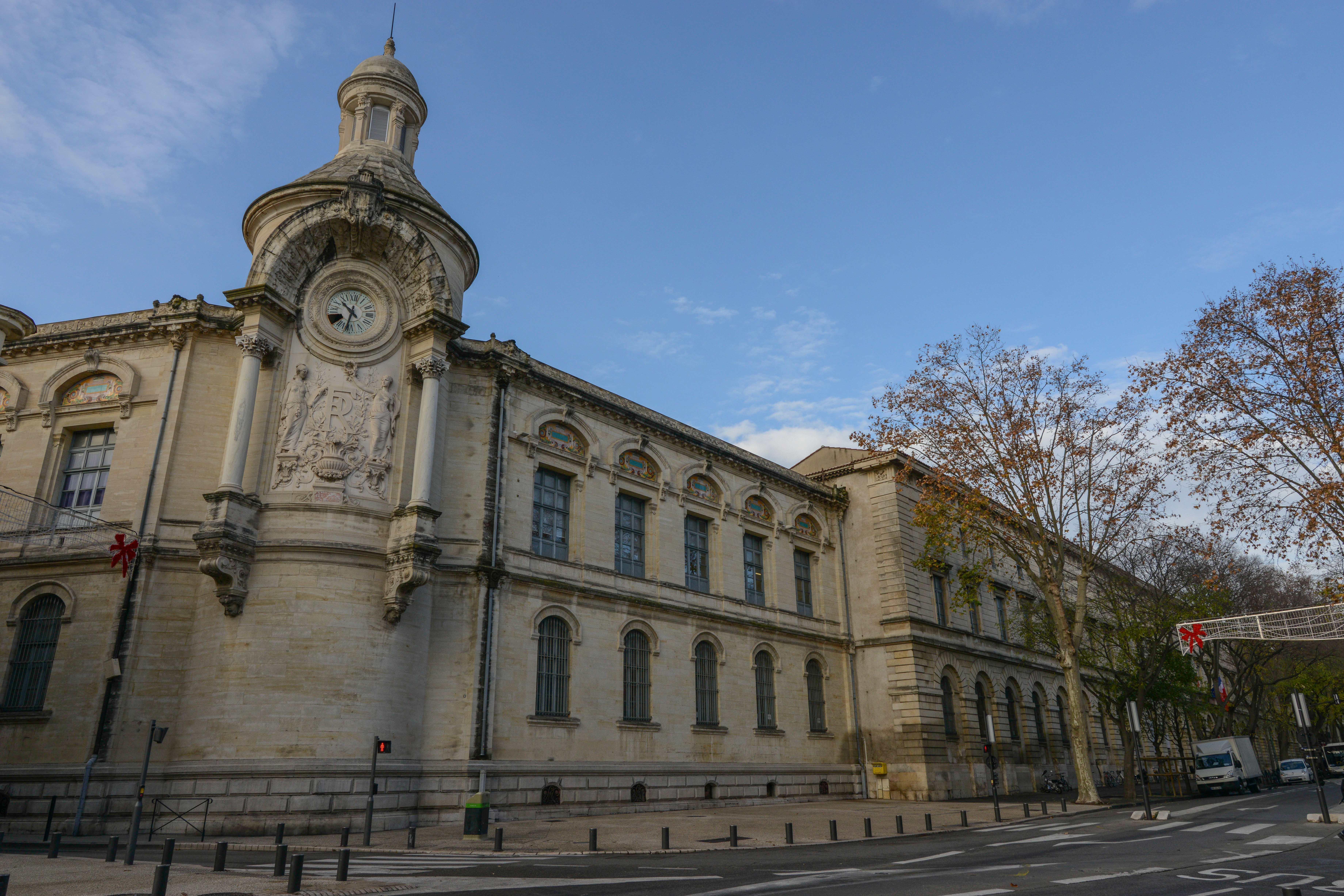 Nimes